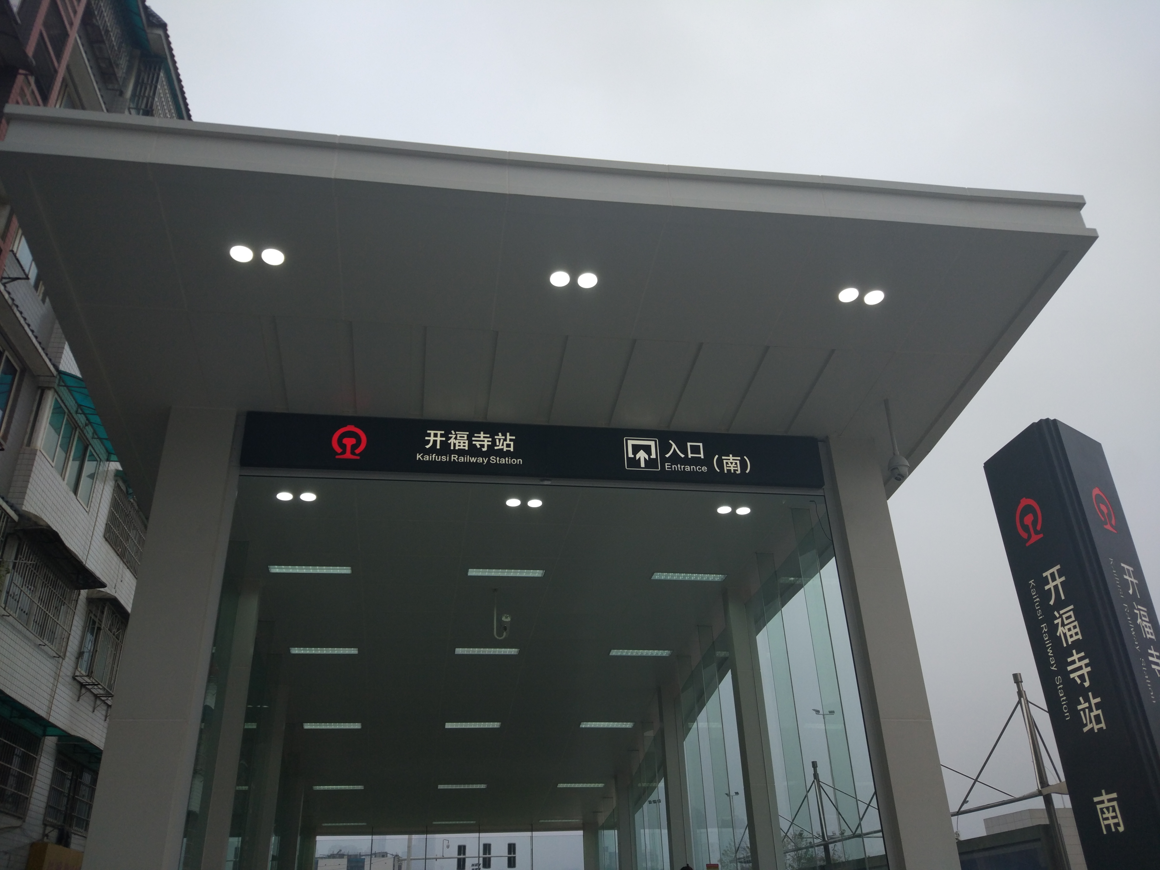 长株潭城际铁路开福寺站南出入口